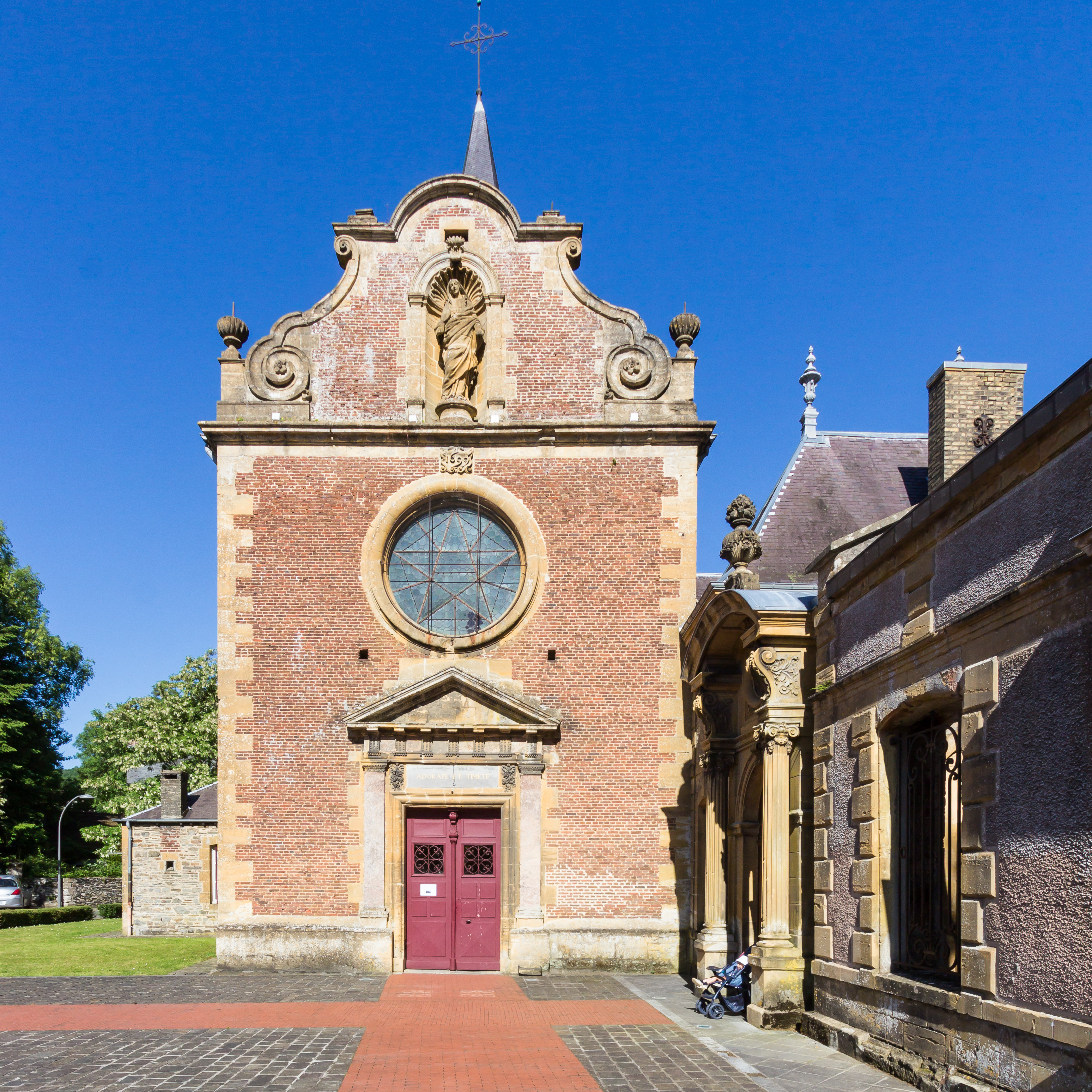 Abbaye de Laval Dieu, Monthermé .